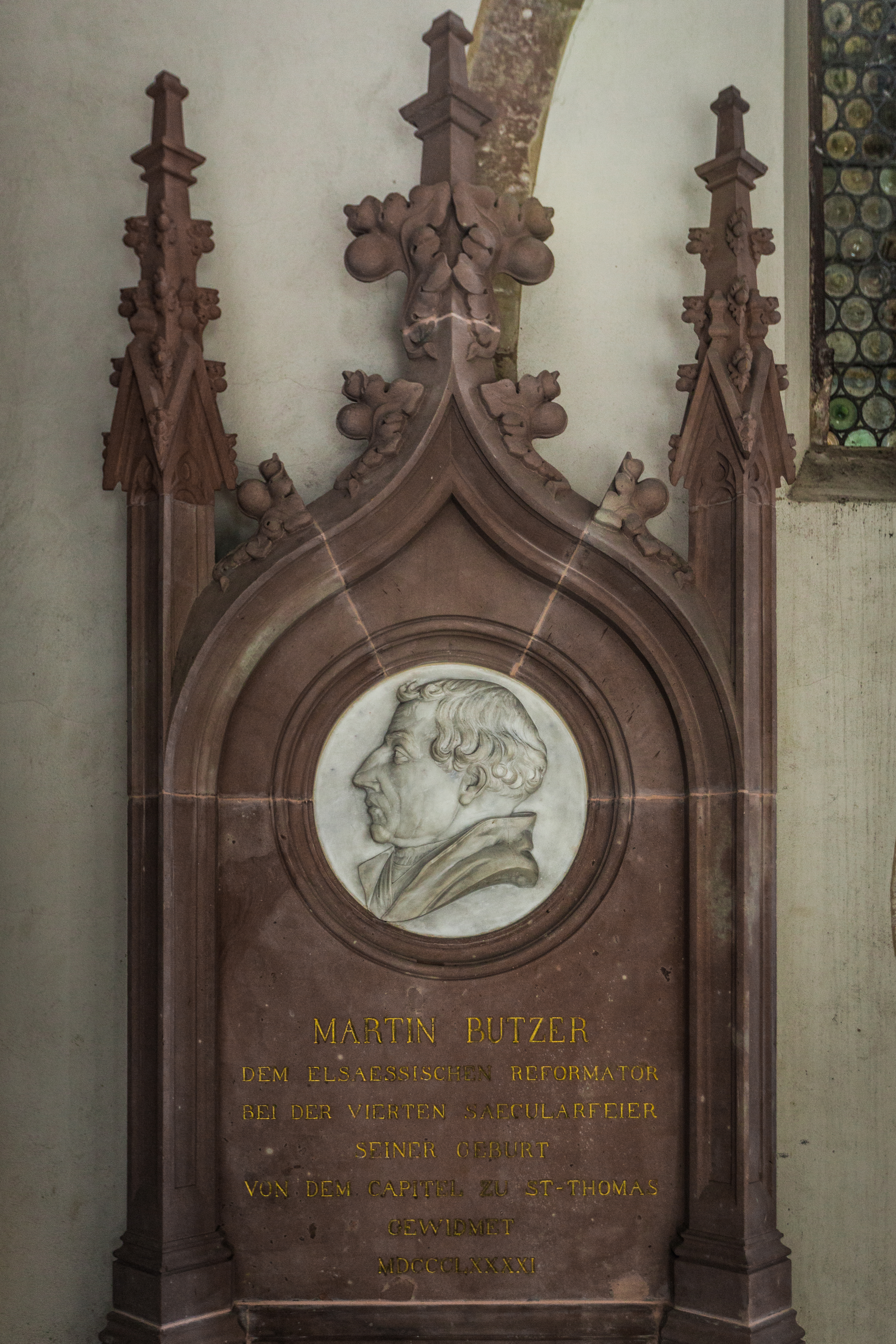 Monument funéraire de Martin Bucer érigé à l’église Saint-Thomas de Strasbourg en 1891. Médaillon du sculpteur badois Johann Riegger